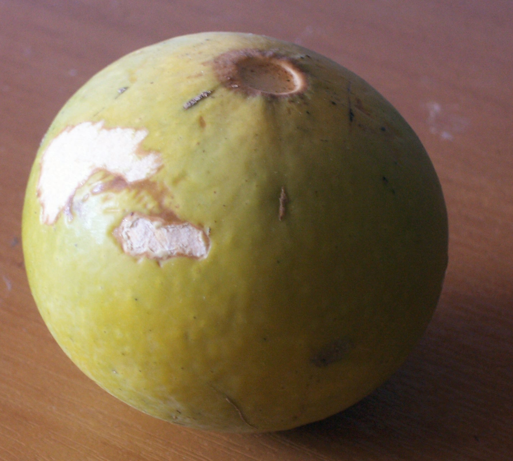 Matamba fruit, Zimbabwe